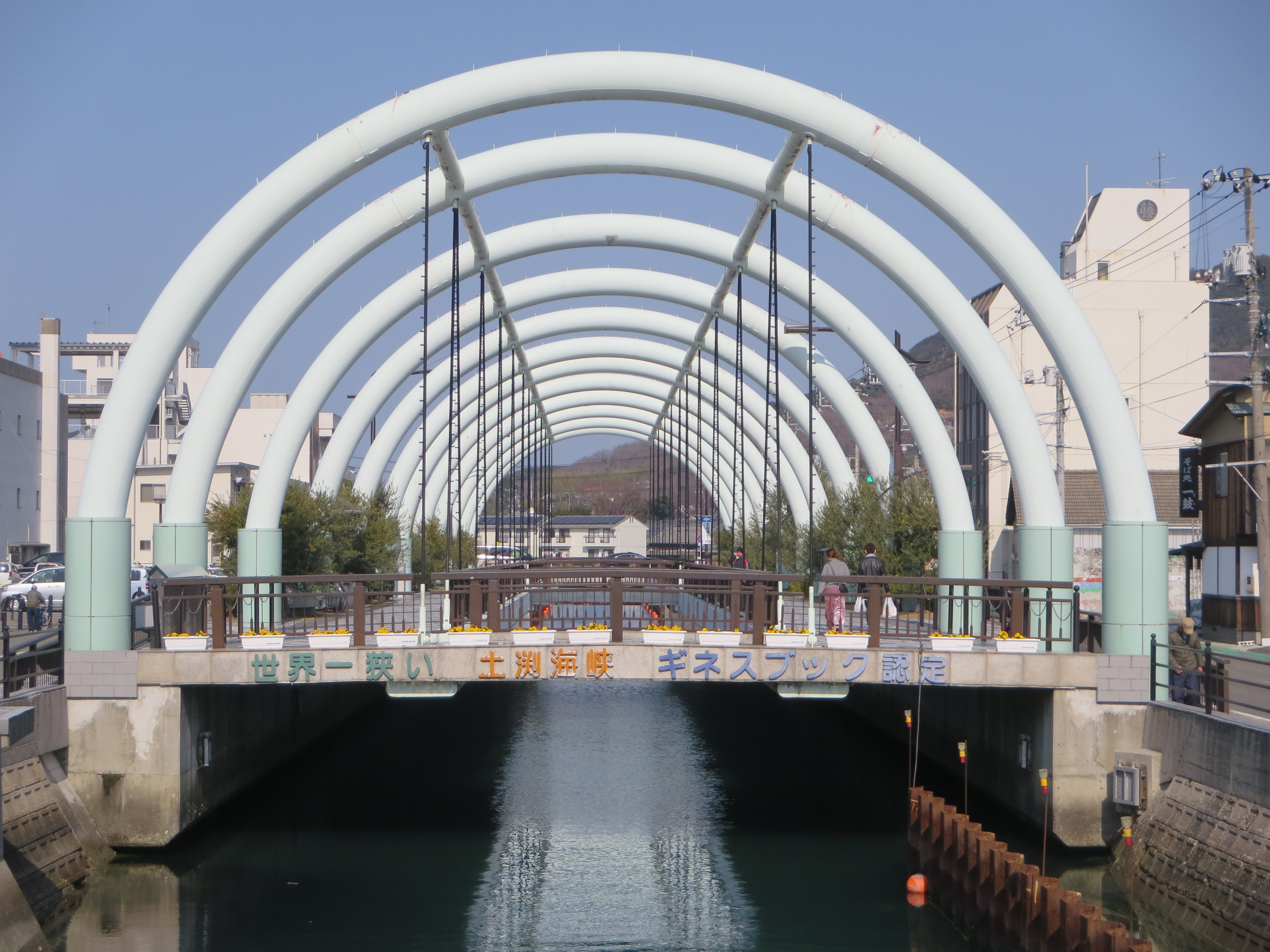 中文（香港）: 小豆島土渕海峽